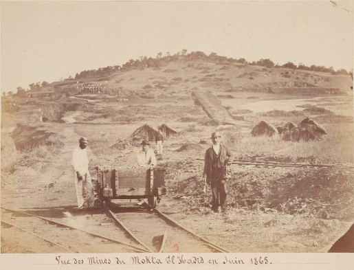 Vue des Mines d Mokta El Hadid en Juin 1865